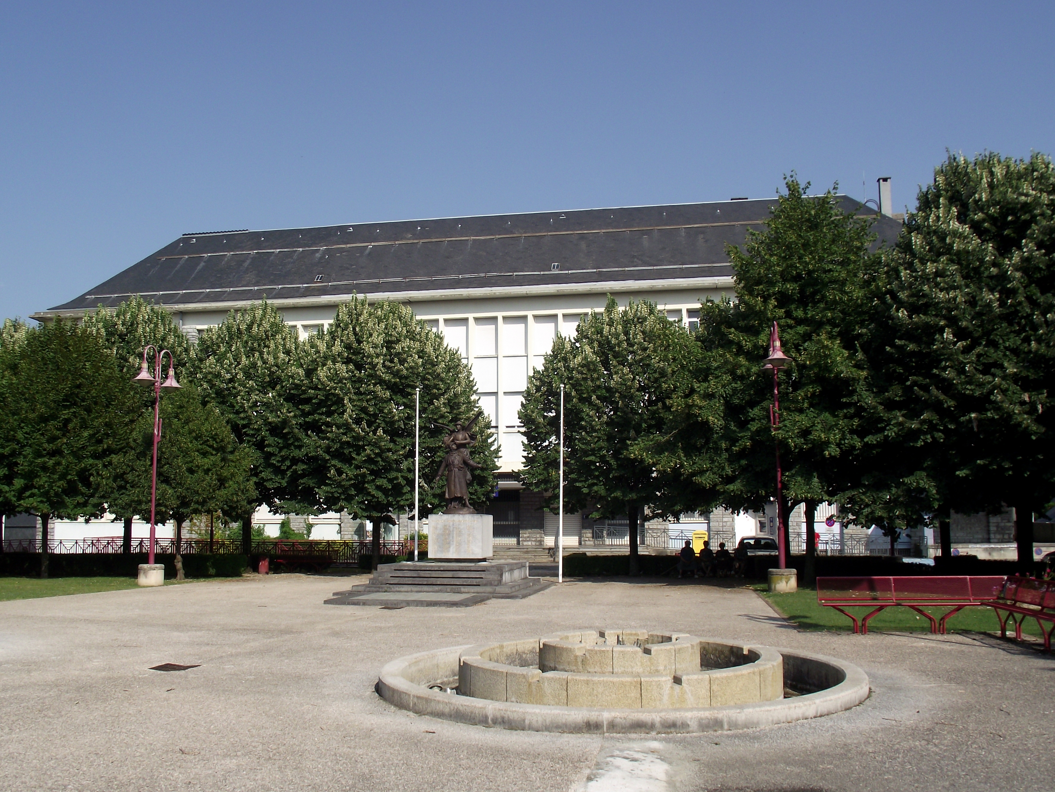 Place de la République (Lannemezan, Hautes-Pyrénées)